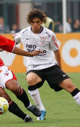 Dodô em ação no Corinthians em 2010.